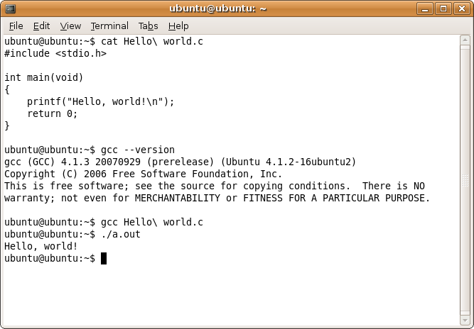 GCC 4.1.3 under Ubuntu 7.10 (en)